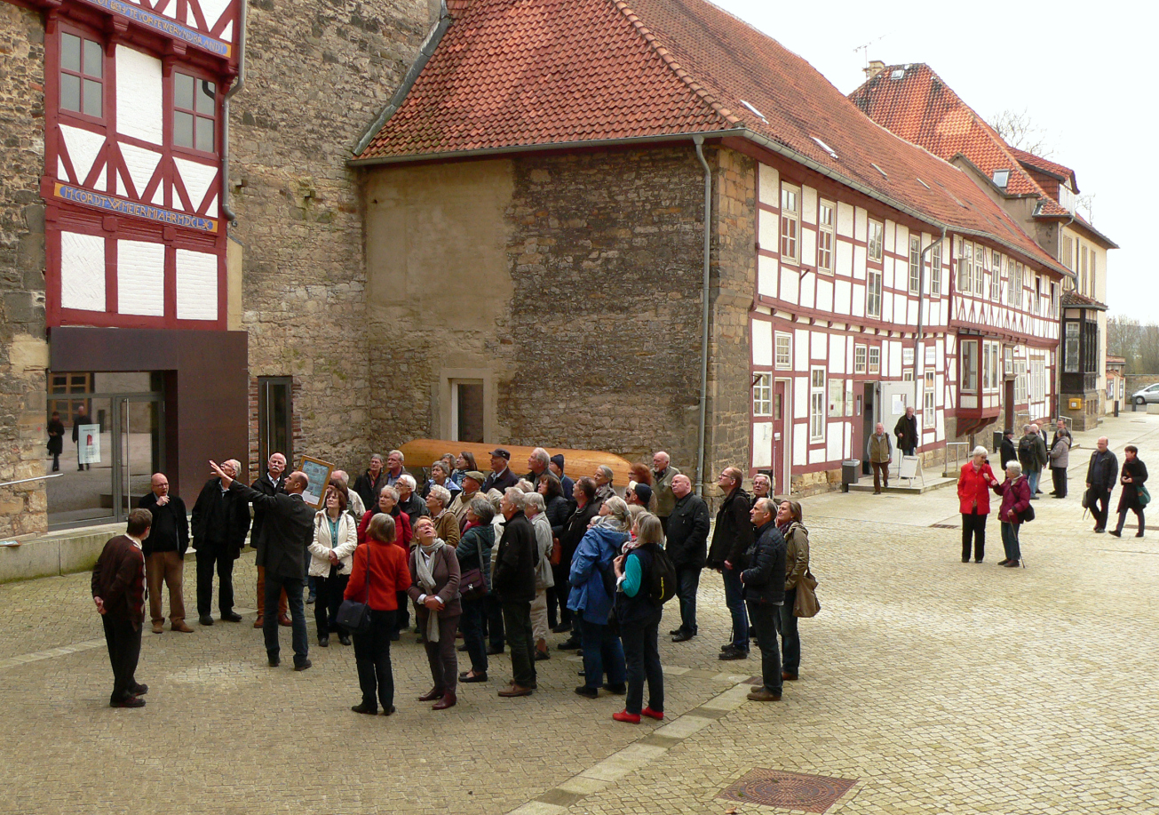 Gesellschaft für Denkmalpflege in Niedersachsen bei einer Exkursion zur Marienburg bei Hildesheim